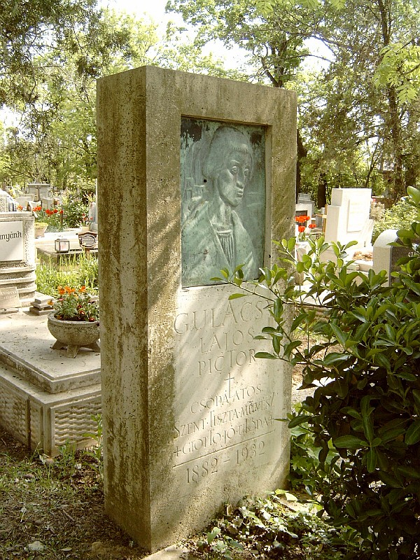 Gulácsy Lajos síremléke a budapesti, Farkasréti temetőben. (Hv20-1-71).